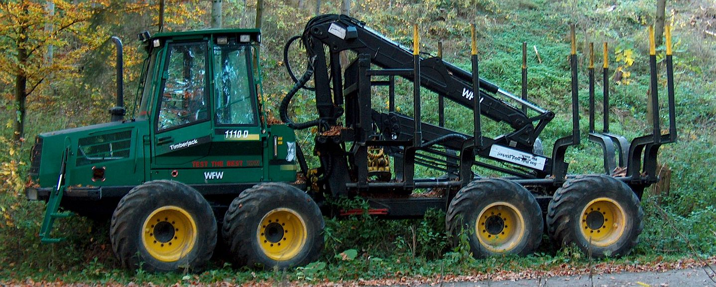 Forwarder WFW Timberjack 1110D